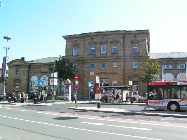 Bahnhof Bayreuth